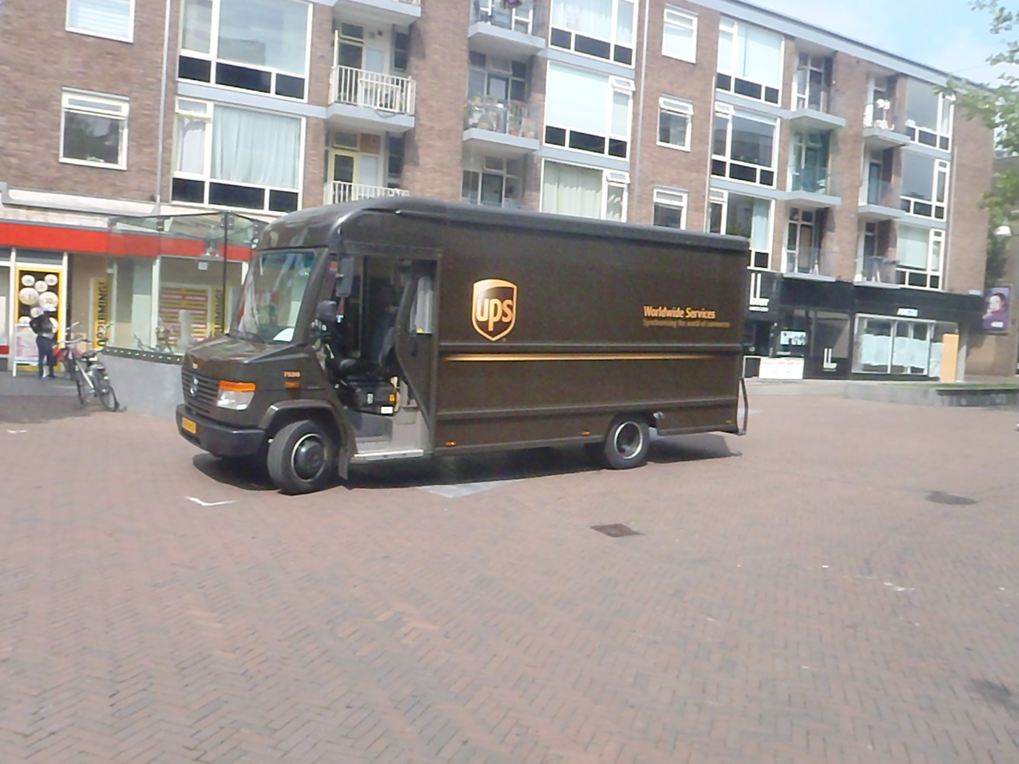 mercedes vario van ups